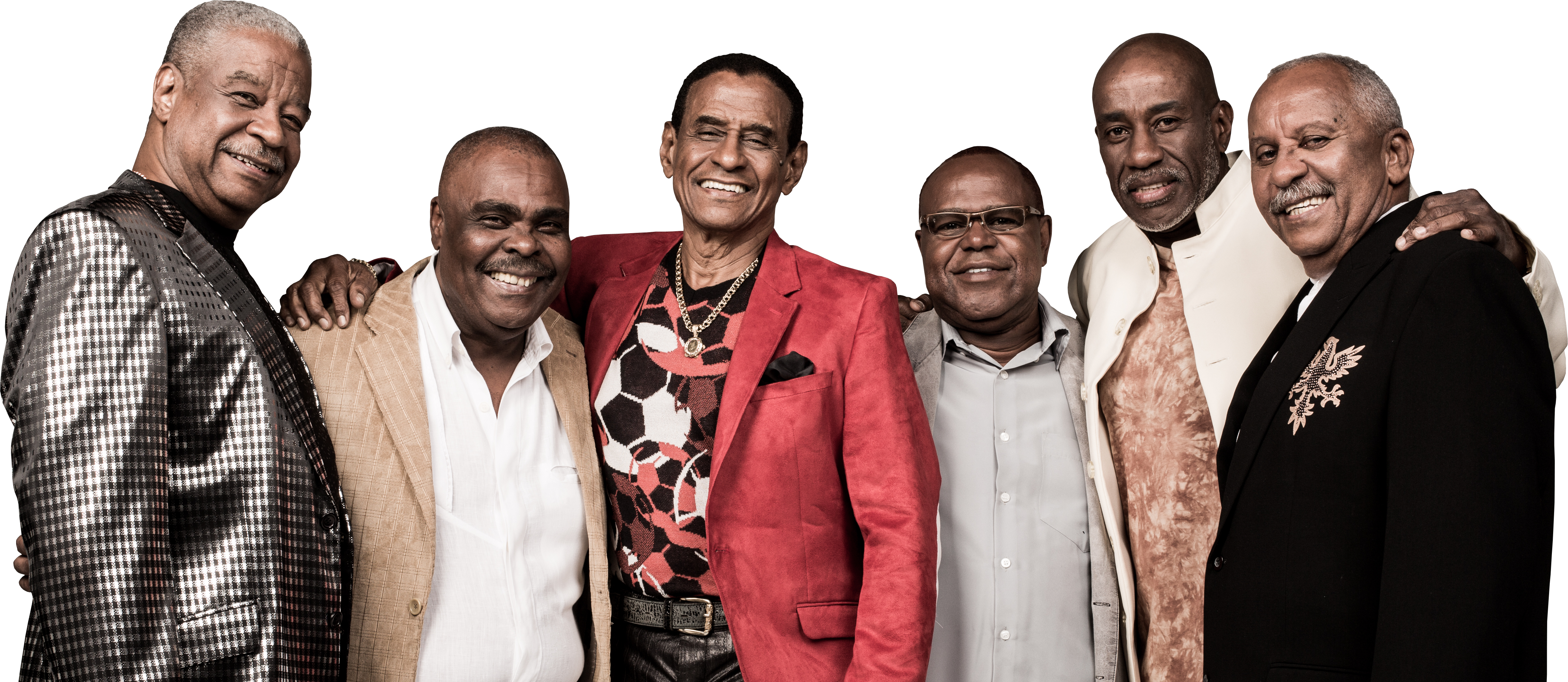 Foto dos integrantes do grupo fundo de quintal em 2015